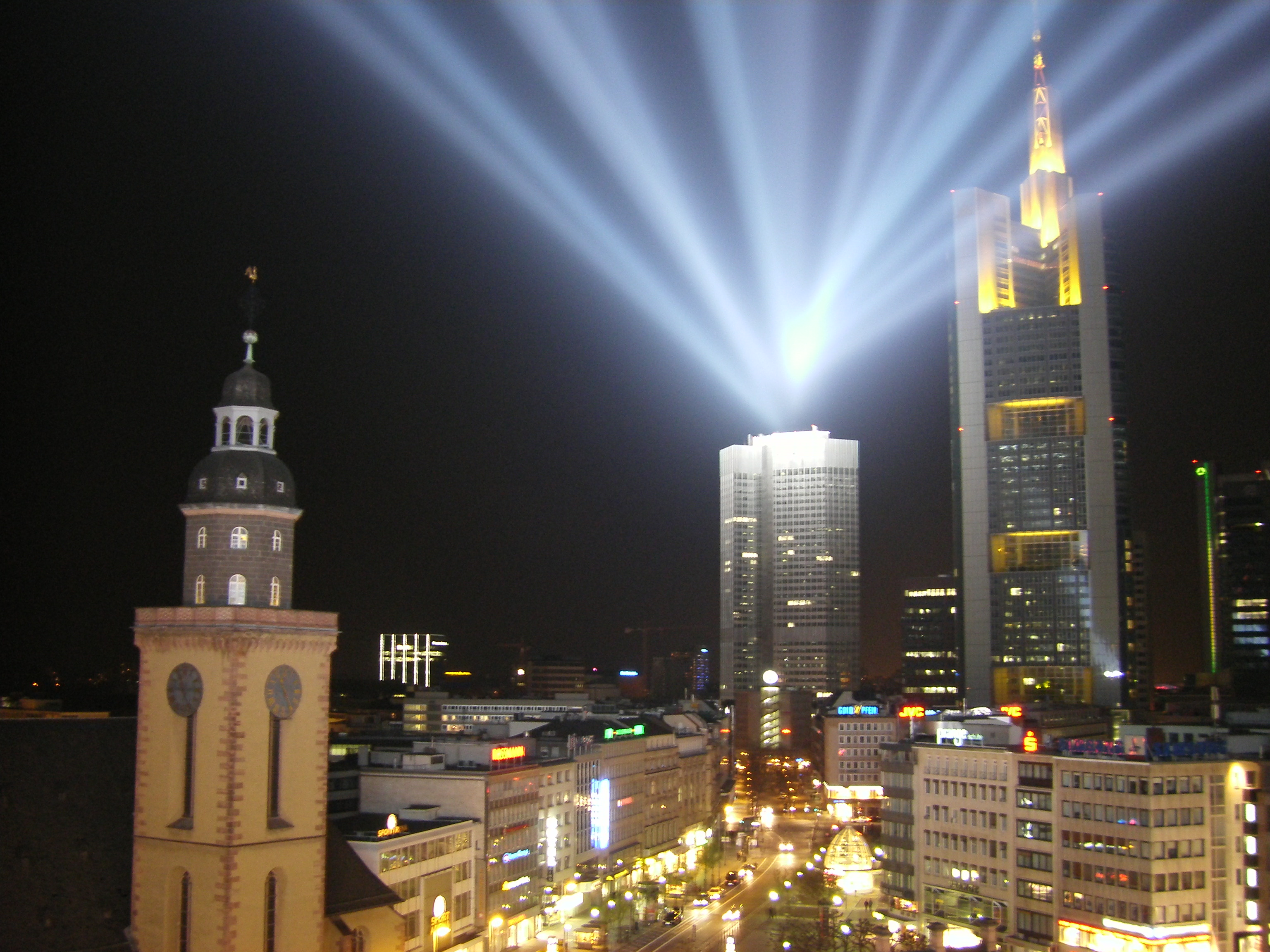 Frankfurt Hauptwache, Luninale 2008